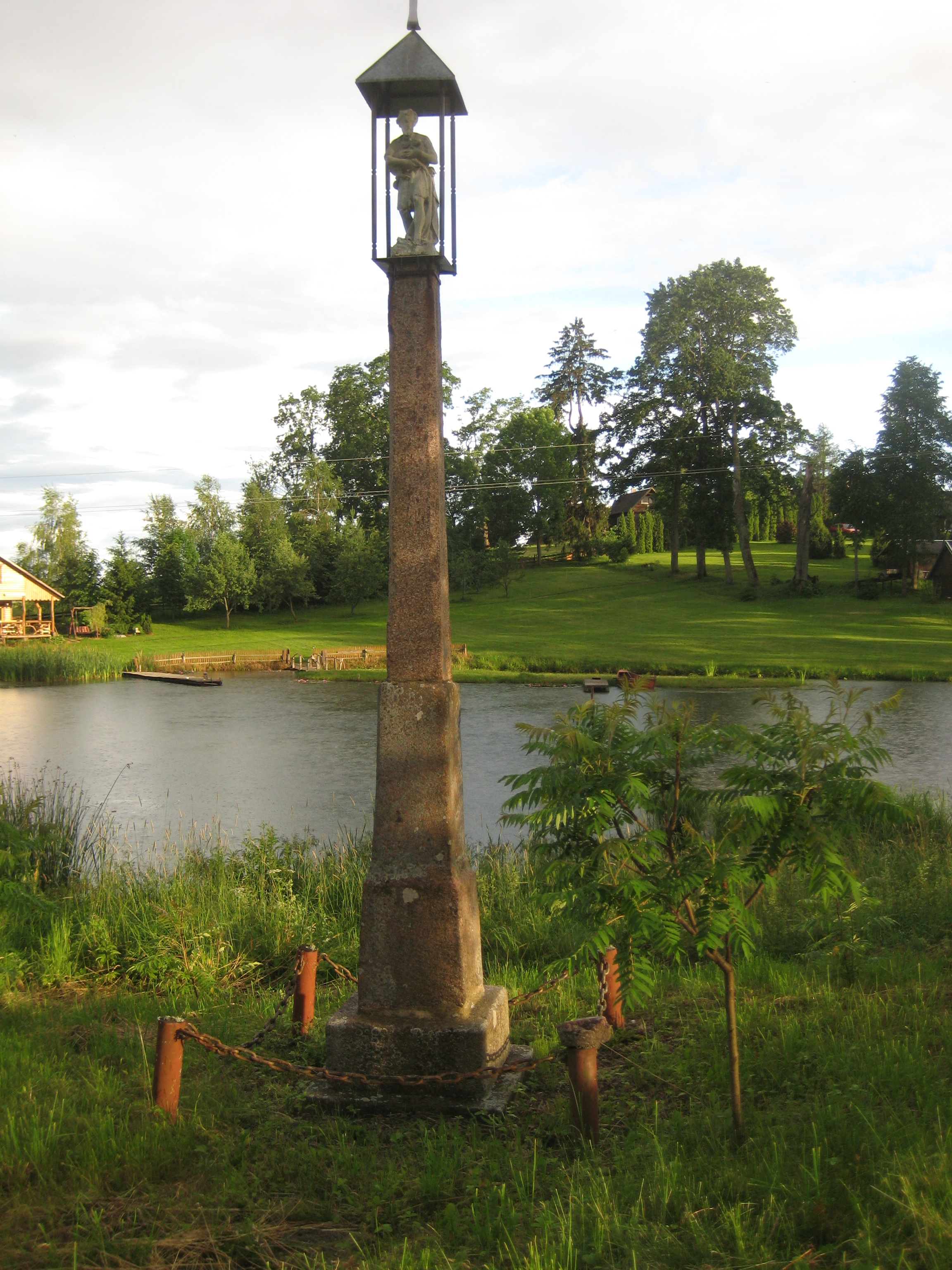 Nadūnai 32403, Lithuania